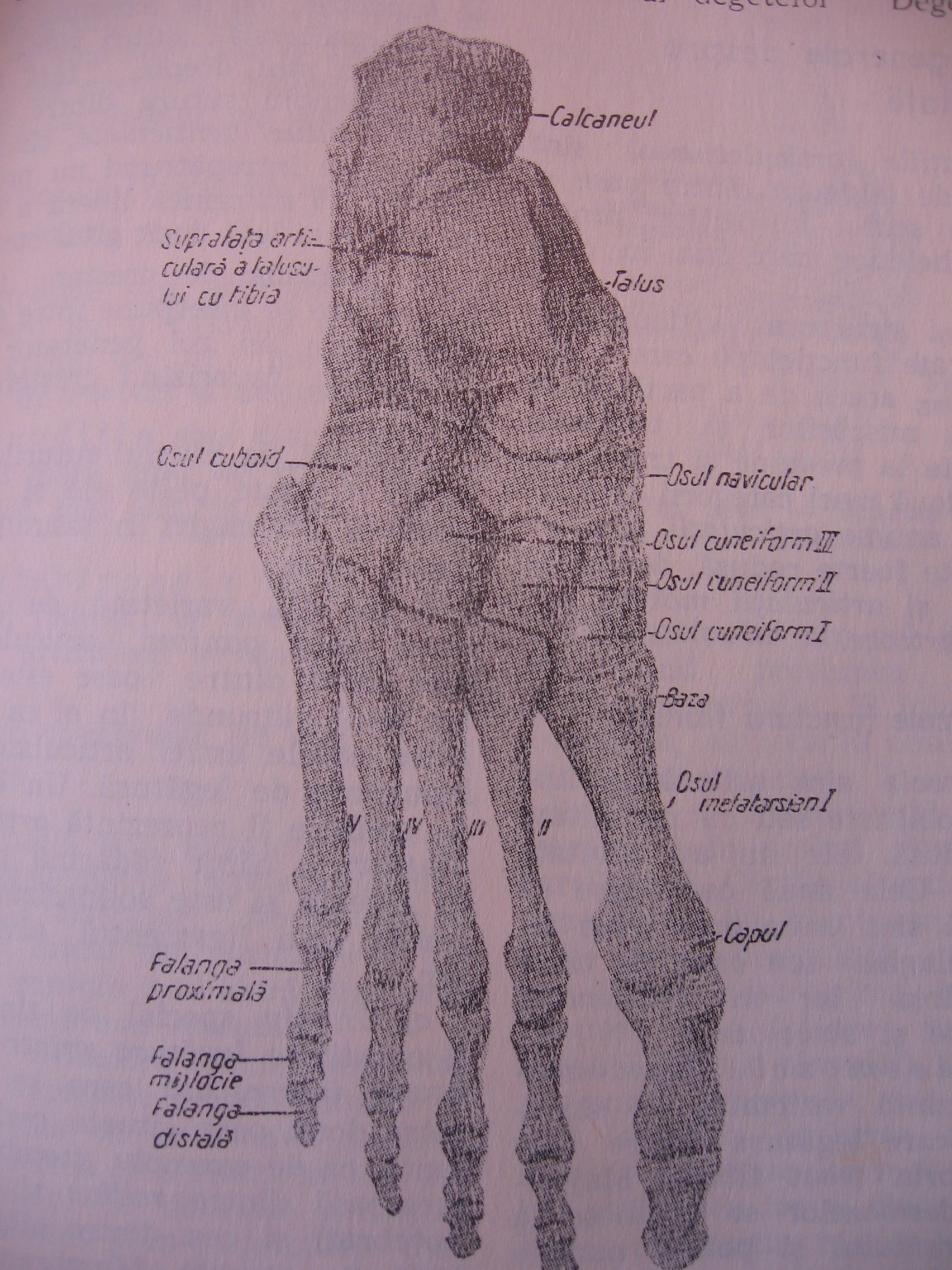 Scheletul gambei